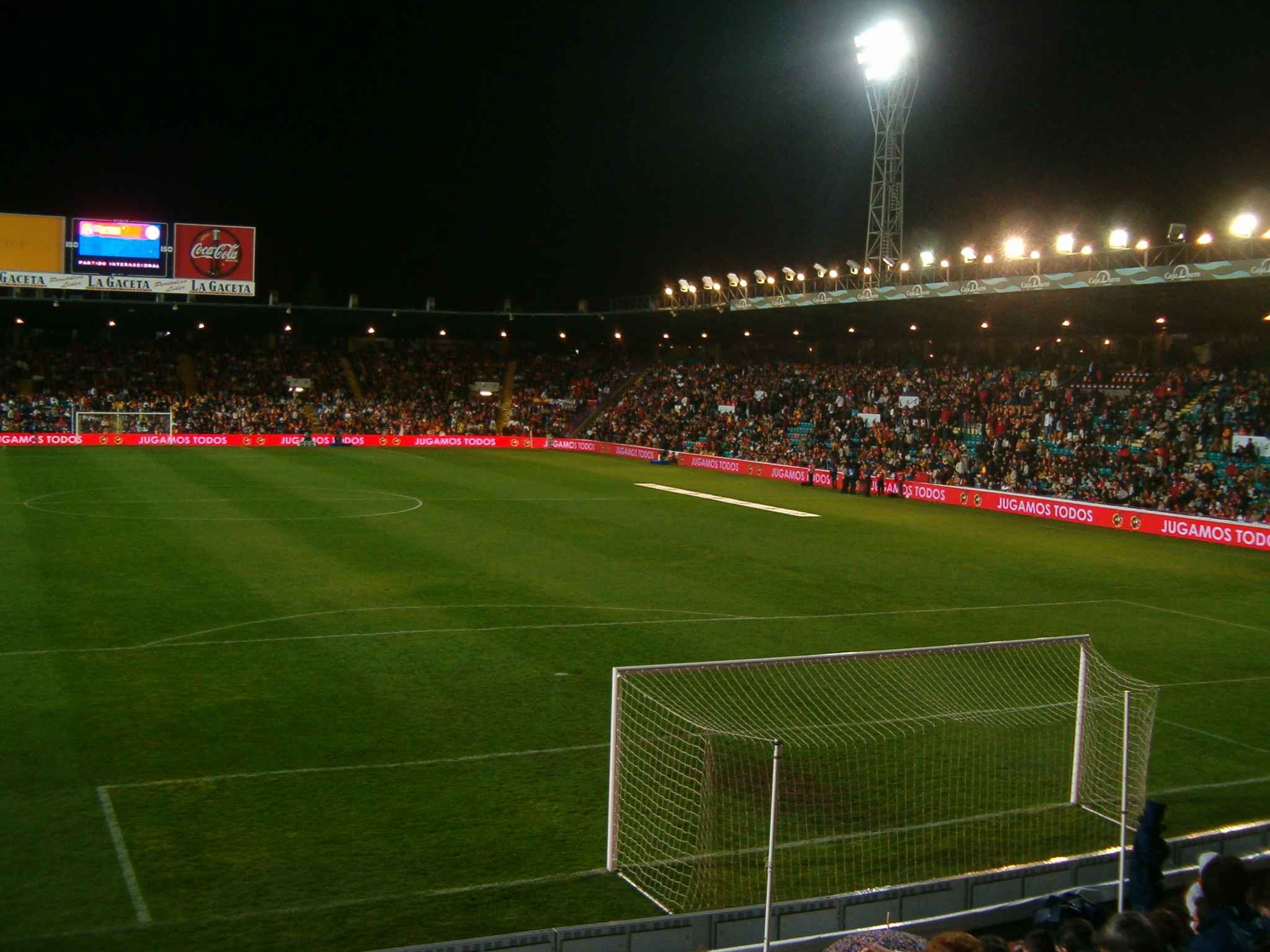 Foto hecha con una cámara digital desde el Fondo Norte del Estadio Helmántico (Salamanca) el día 26 de marzo de 2005. Se muestra el interior del estadio en un partido internacional amistos entre las selecciones de España y China.